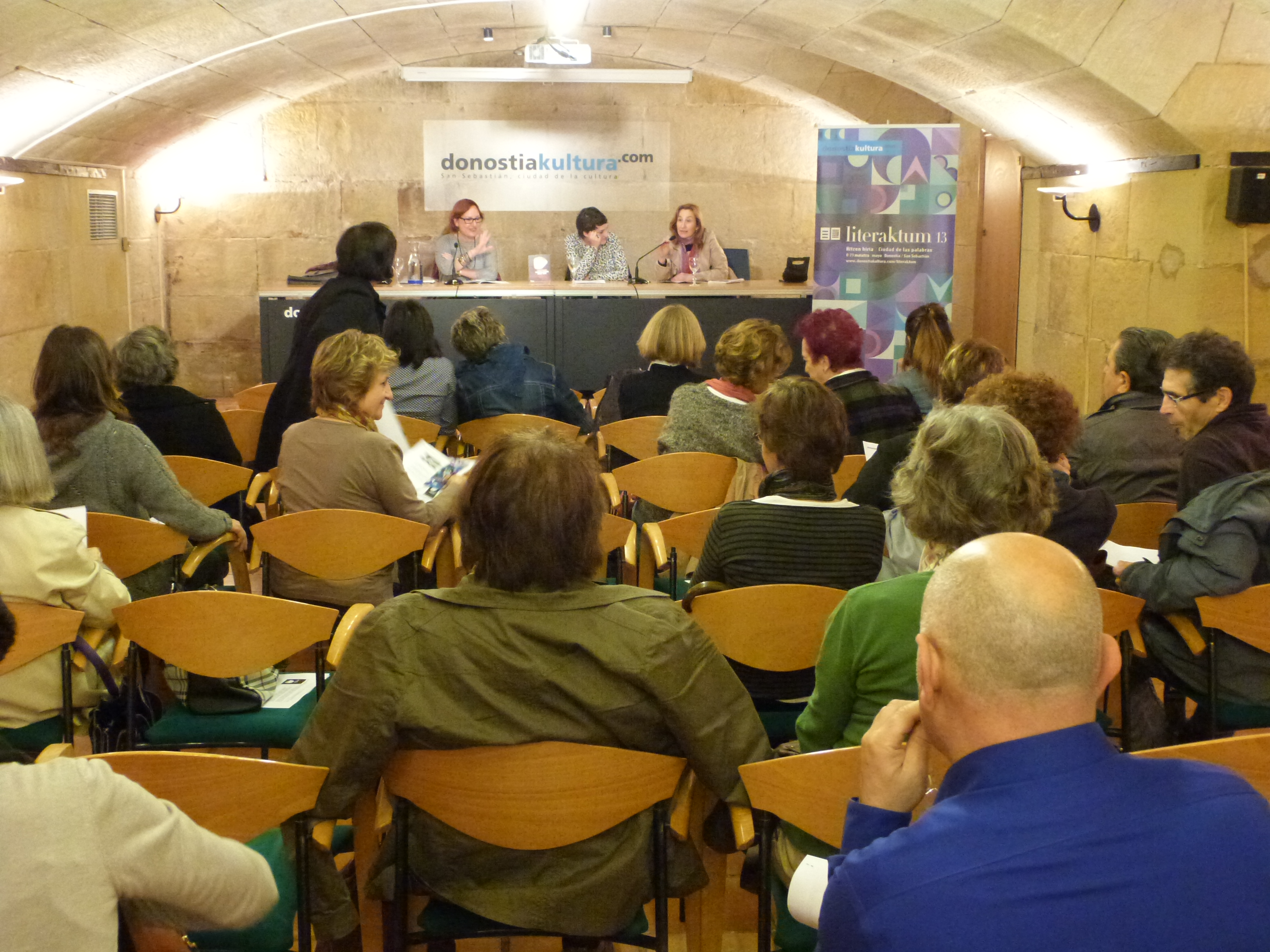 Donostiako Liburutegi Nagusiaren jarduera aretoa, San Jeronimo kalea.